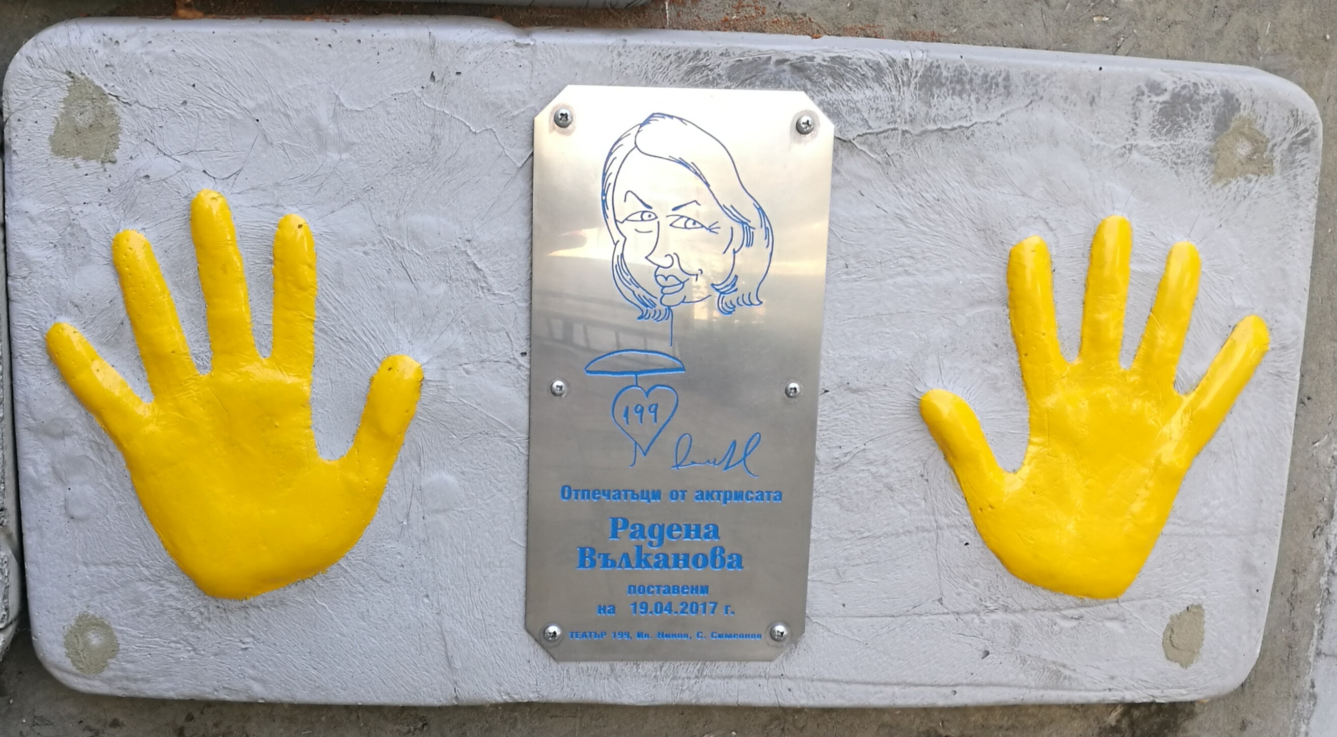 Стената на славата пред Театър 199 - пано с отпечатъци, послание и шарж на Радена Вълканова.